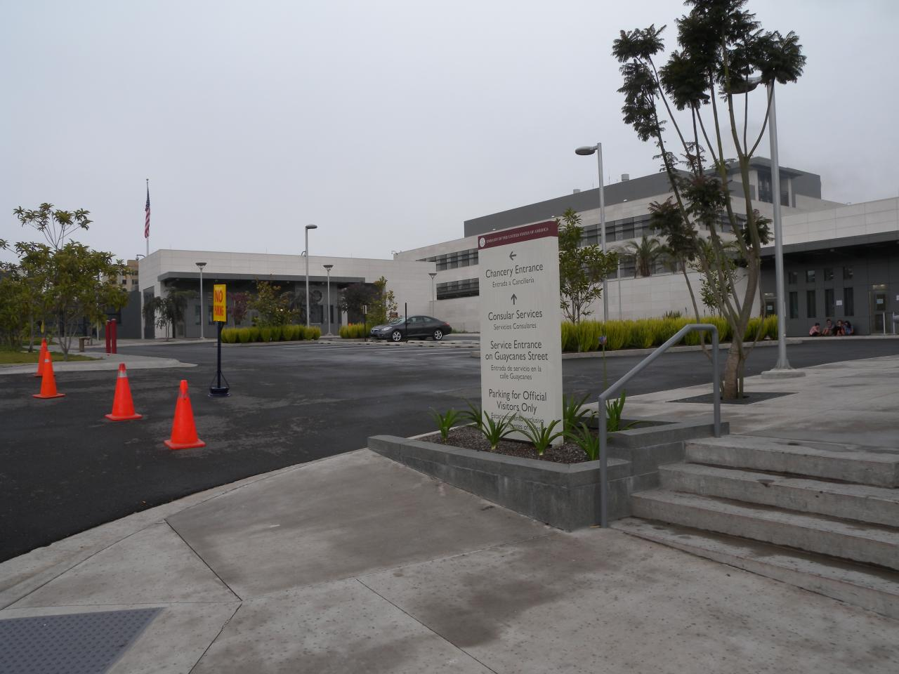 U.S. Embassy in Ecuador